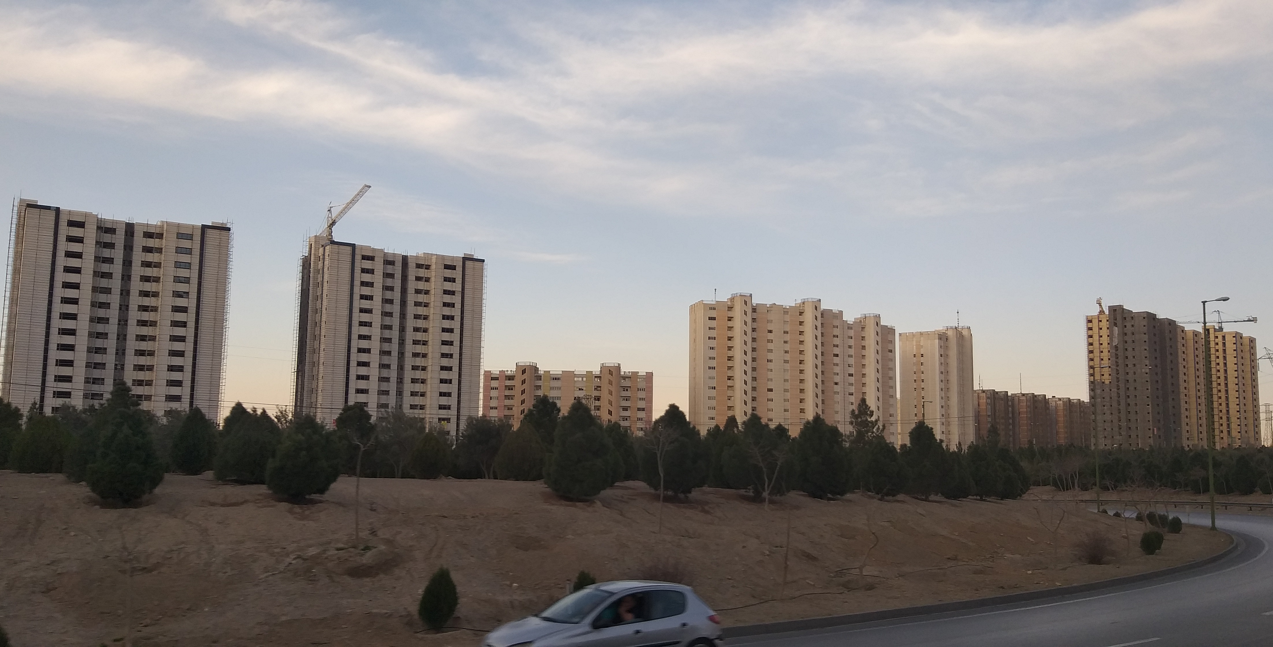 اصفهان